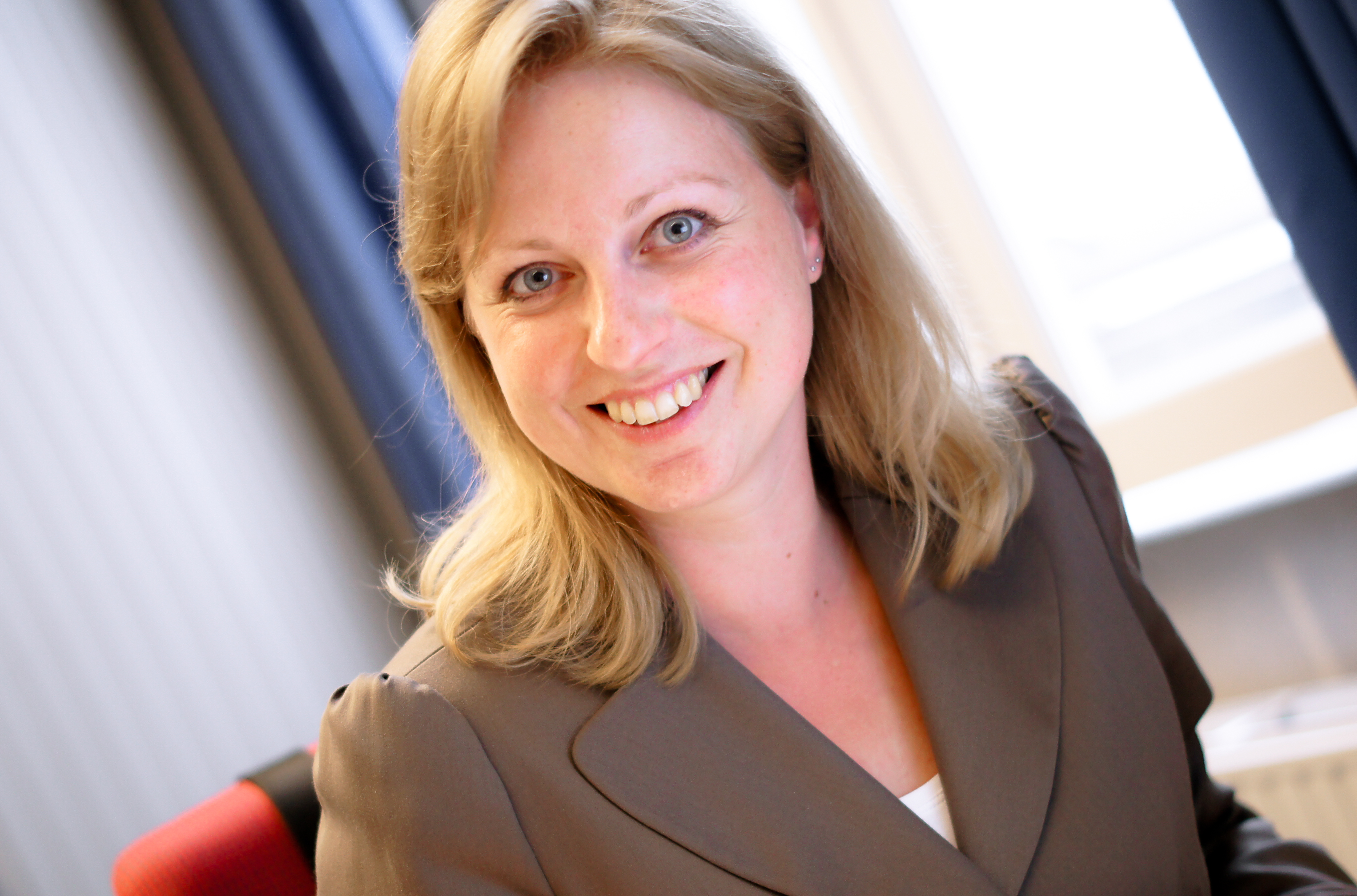 Karin Cornelia Josepha Straus (Roermond, 6 april 1971) is een Nederlands politica voor de VVD.